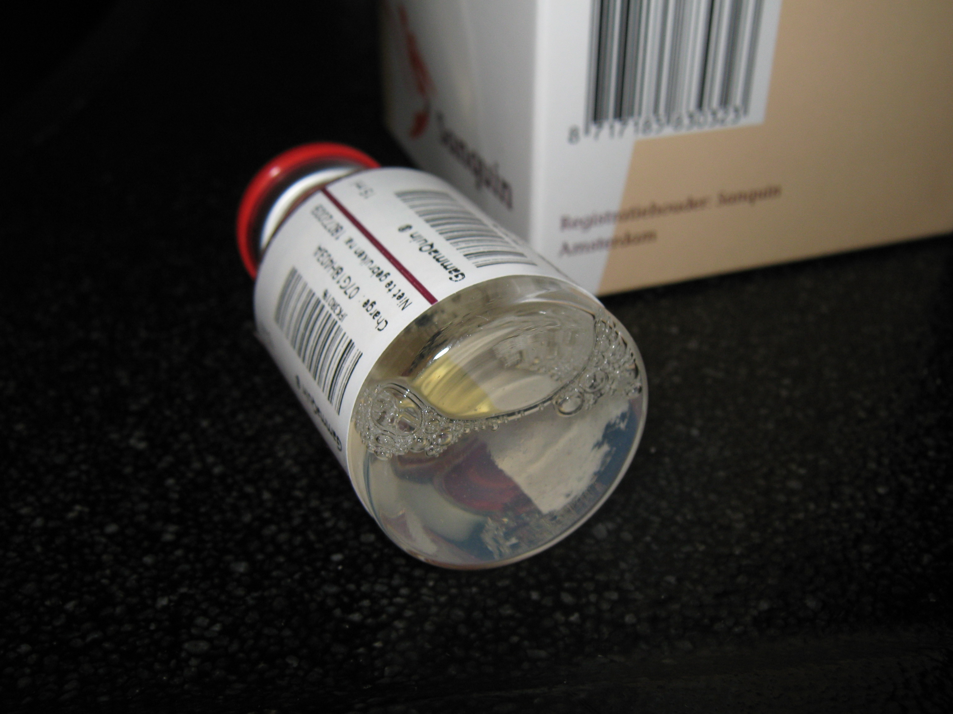 Immunoglobulinen